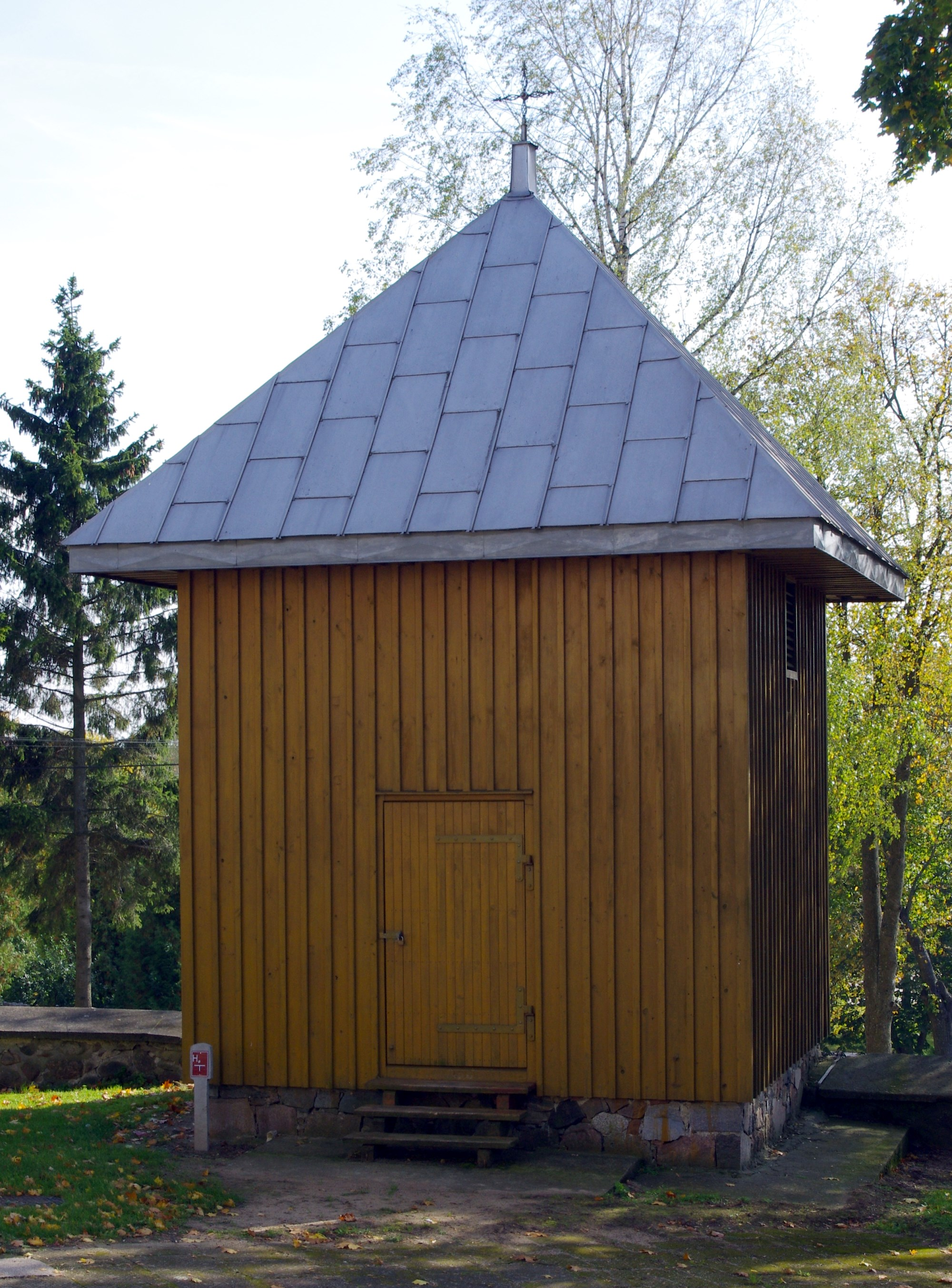 Drewniana dzwonnica z 1862 r. przy kościele p.w. św. Teresy w Wiżajnach. Wiżajny, Wiżajny 06.1986.